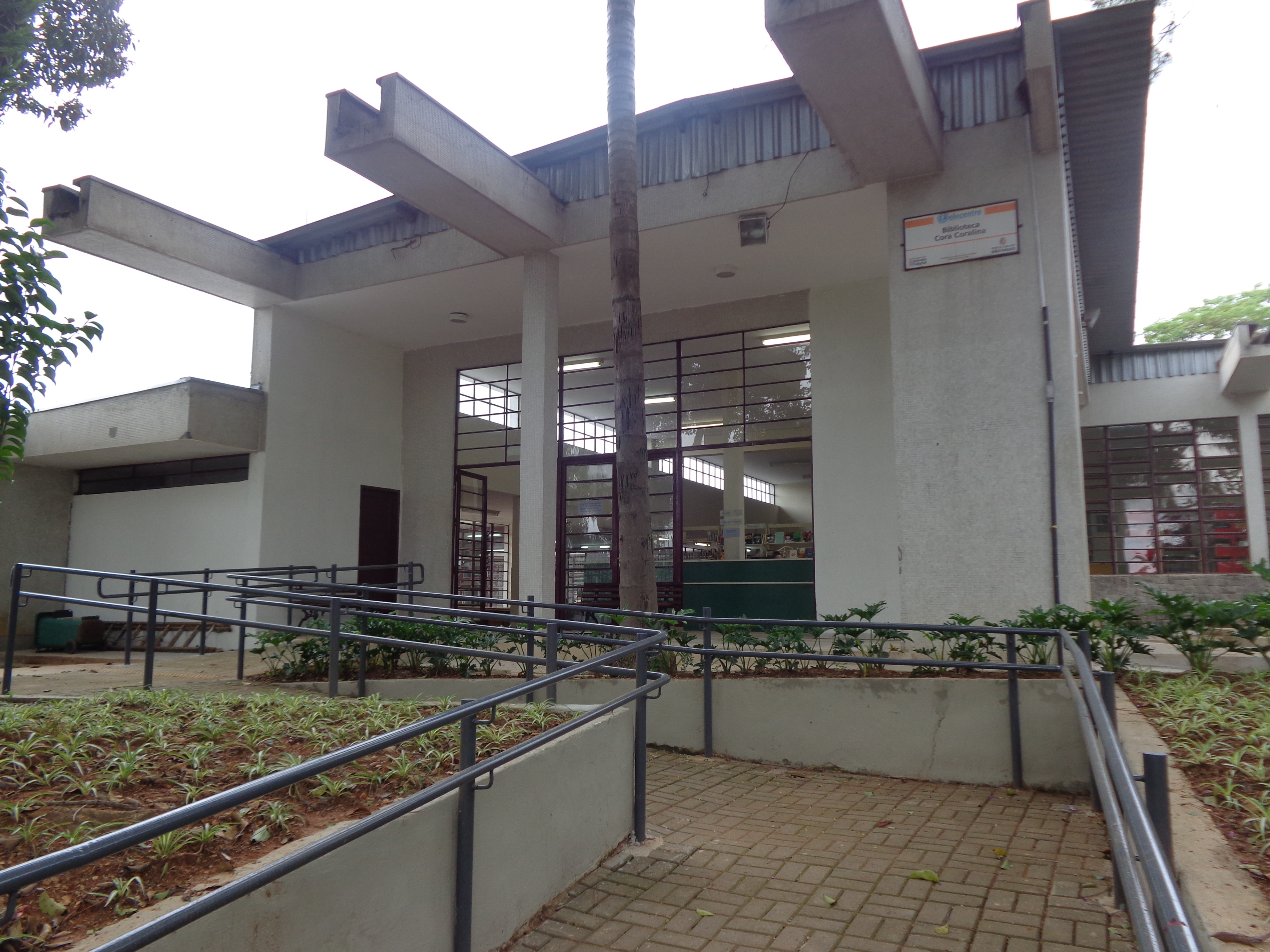 Biblioteca Cora Coralina